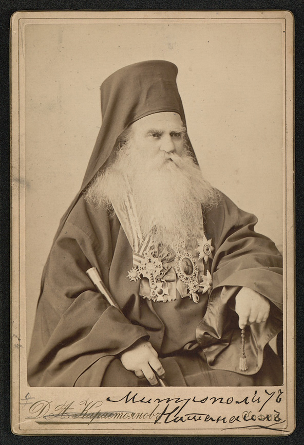 Митрополит Натанаил Охридски и Пловдивски